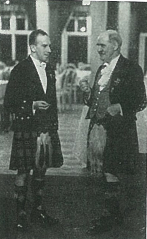 Zwei Schottische Deligierte